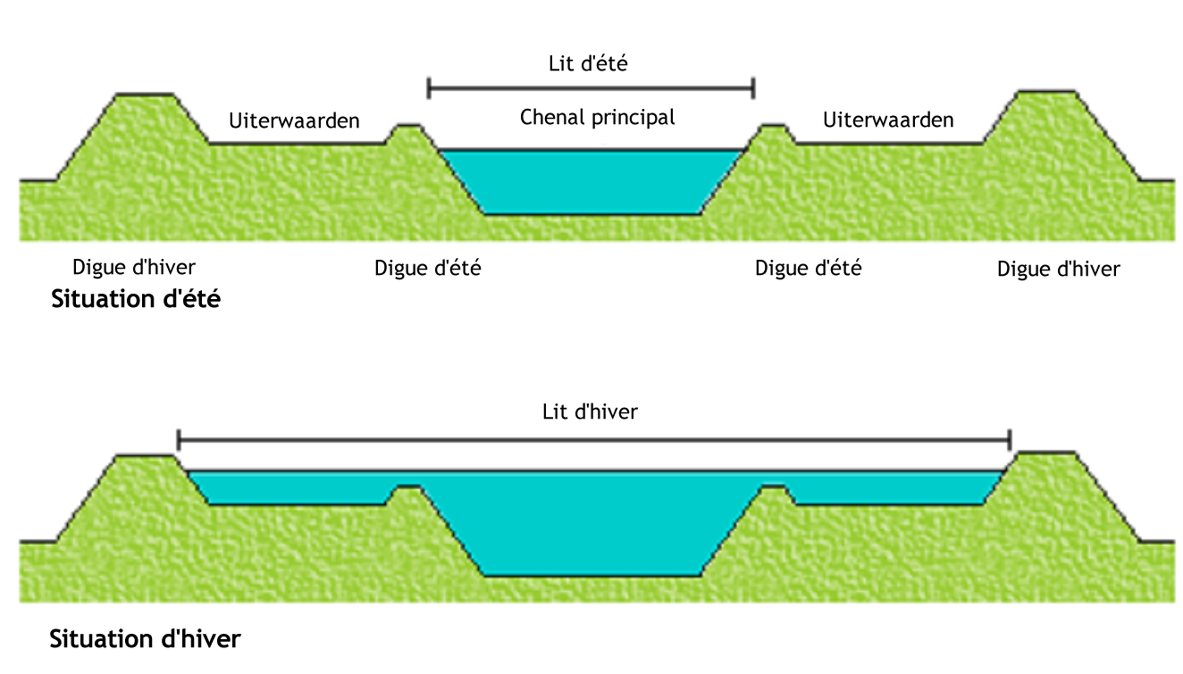 C'est le schéma du lit d'une rivière.